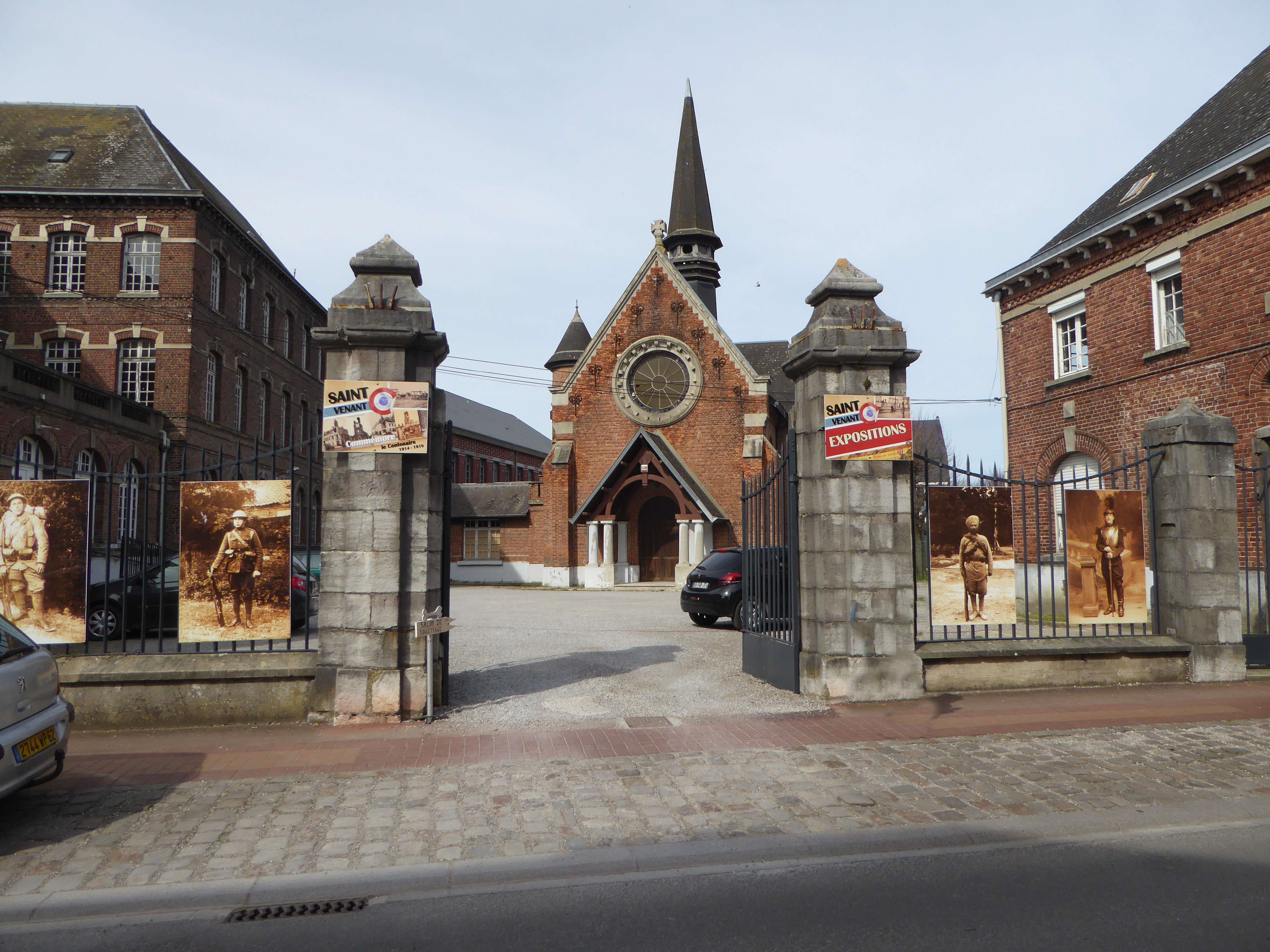 Chapelle de l'ancien hospice, dans la cour se trouve une fontaine qui serait un don de Louis XIV Saint-Venant Pas-de-Calais.- France.